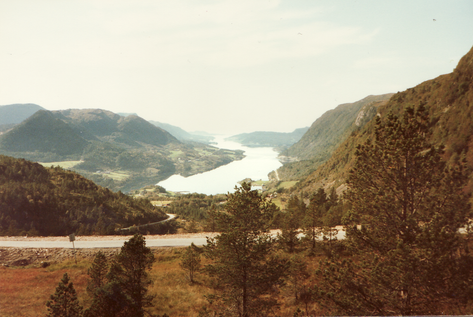 Årvågsfjorden i Aure på Nordmøre